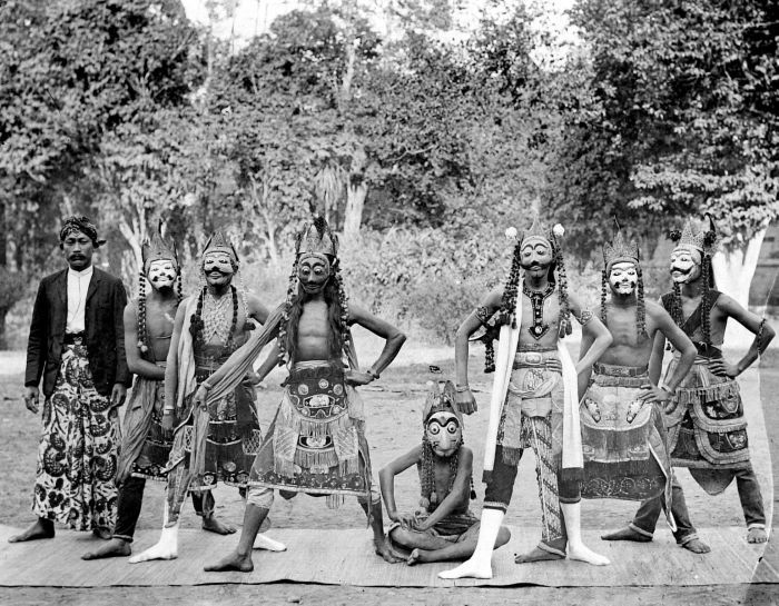 Repronegatief. In Indonesië zijn verschillende dansuitvoeringen waarin het Ramayana als verhaallijn dient. Bijvoorbeeld de Kecak dans en de Wajang wong van Bali. Wajang wong vindt zijn oorsprong in de laat 18e eeuw, begin 19e eeuw. De koning van Klungkung (Bali), genaamd Dalem Gede Kusumba vroeg zijn hofdansers een nieuw dansdrama te maken met het Ramayana als verhaallijn en de Koninklijk maskers als versiering. Tijdens een wajang wong opvoering dragen de spelers maskers en versierde kostuums. De spelers dansen, zingen en spreken onder begeleiding van muziek. Tegenwoordig is de dans erg populair bij toeristen. . Een wajang wong voorstelling bij de regent van Malang